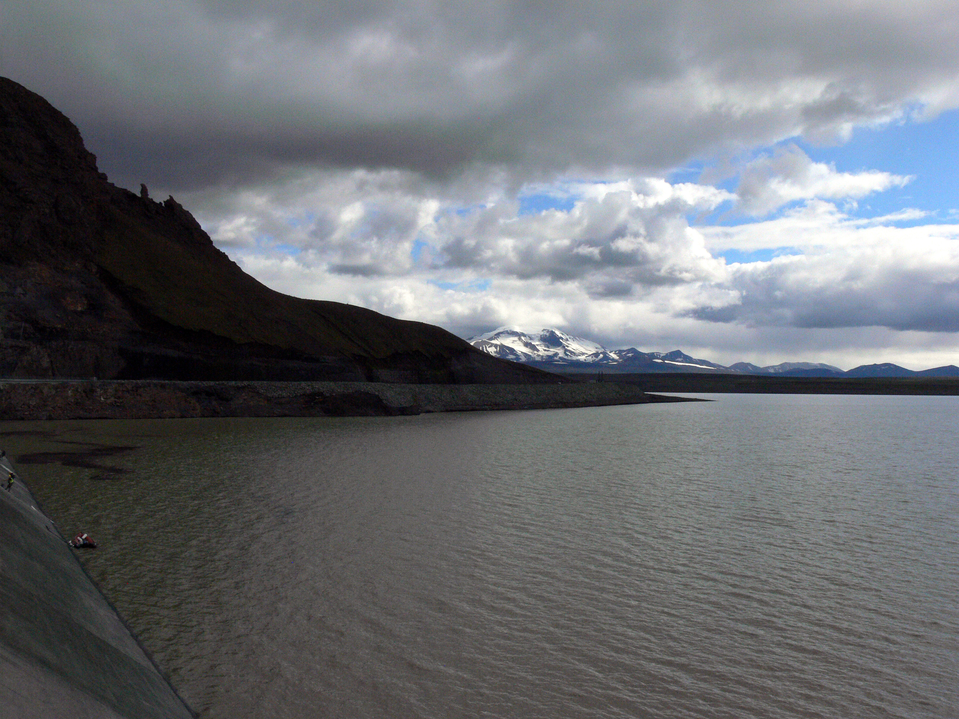 Die aufgestaute Jökulsá á Brú. Hálslón.